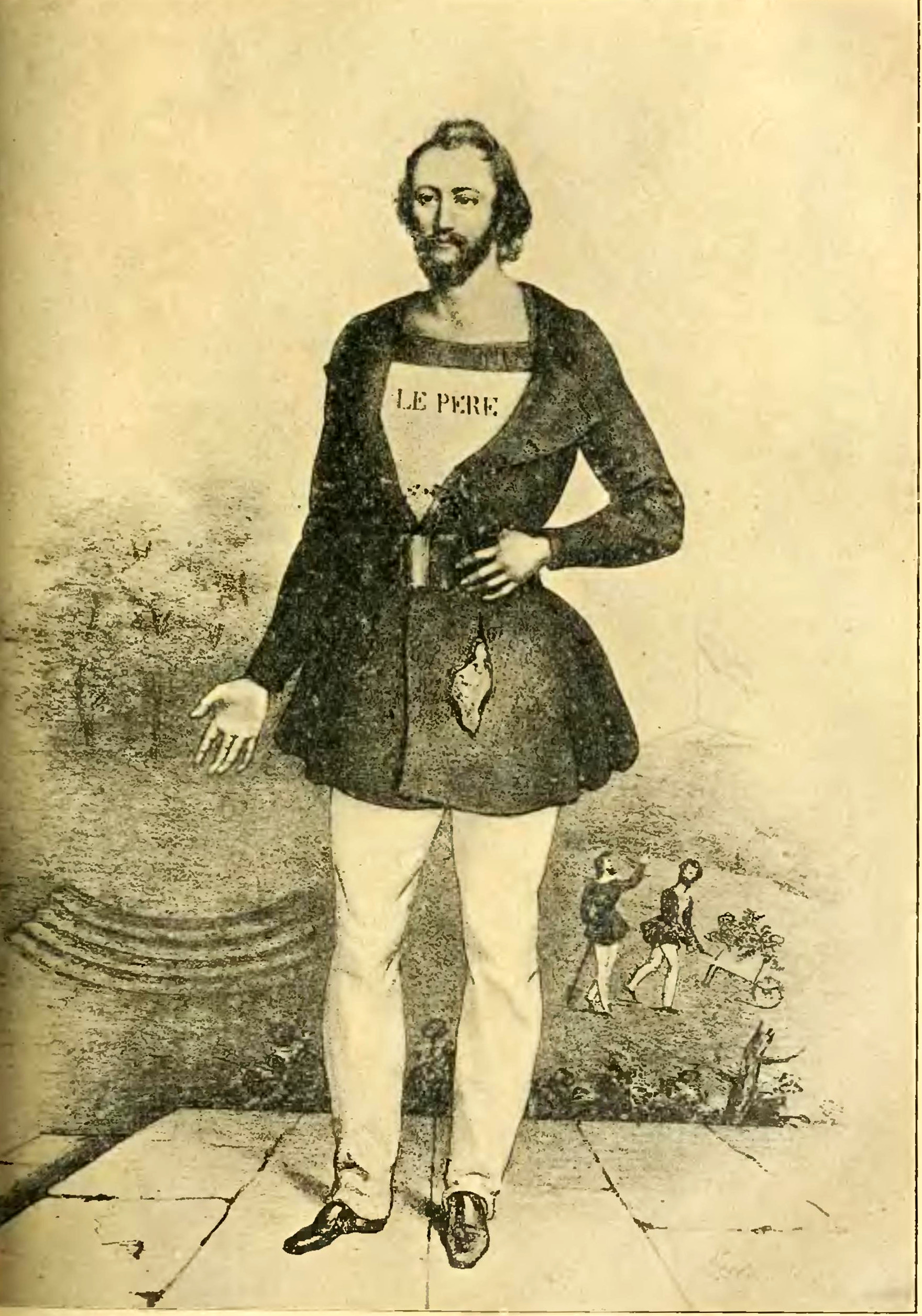 Histoire socialiste sous la direction de Jean Jaurès 1908, Volume 8, Le règne de Louis-Philippe, illustration page 189